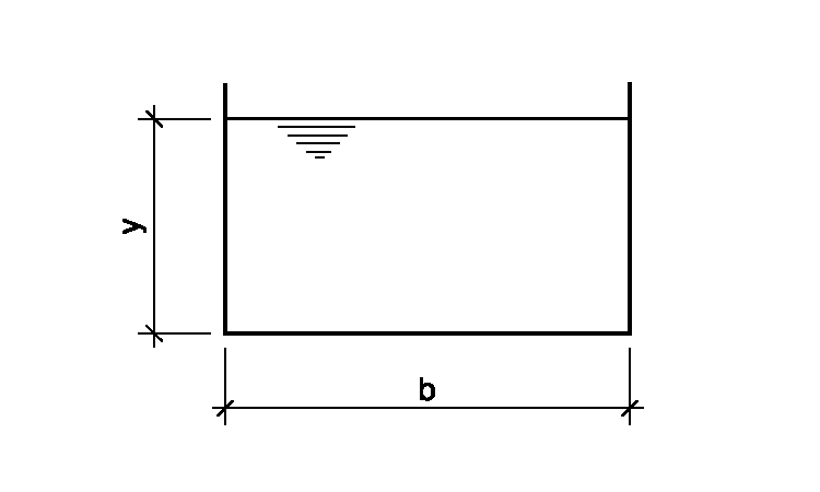 Jednoduché schema obdélníkového koryta